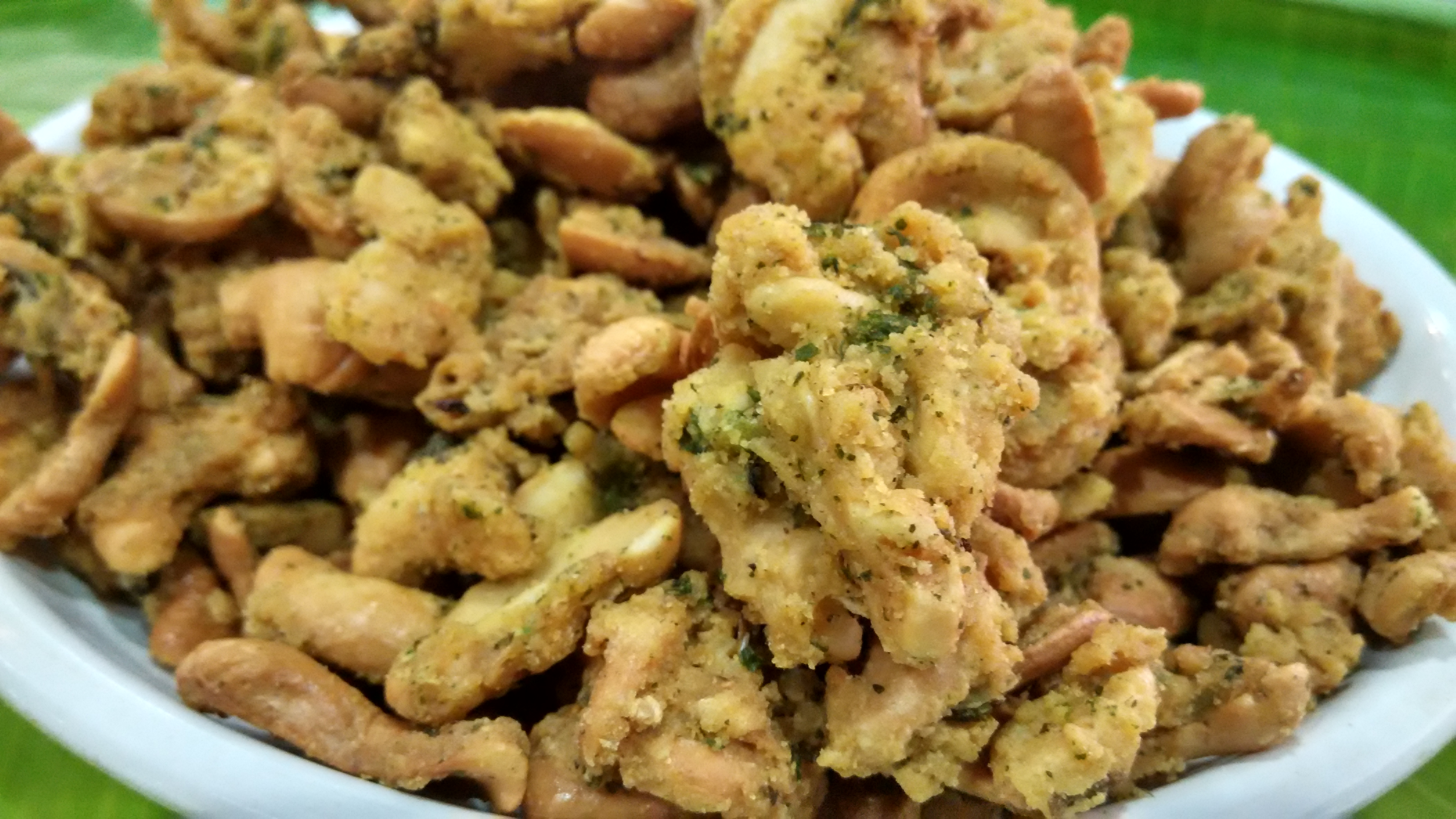 முந்திரி பகோடா.